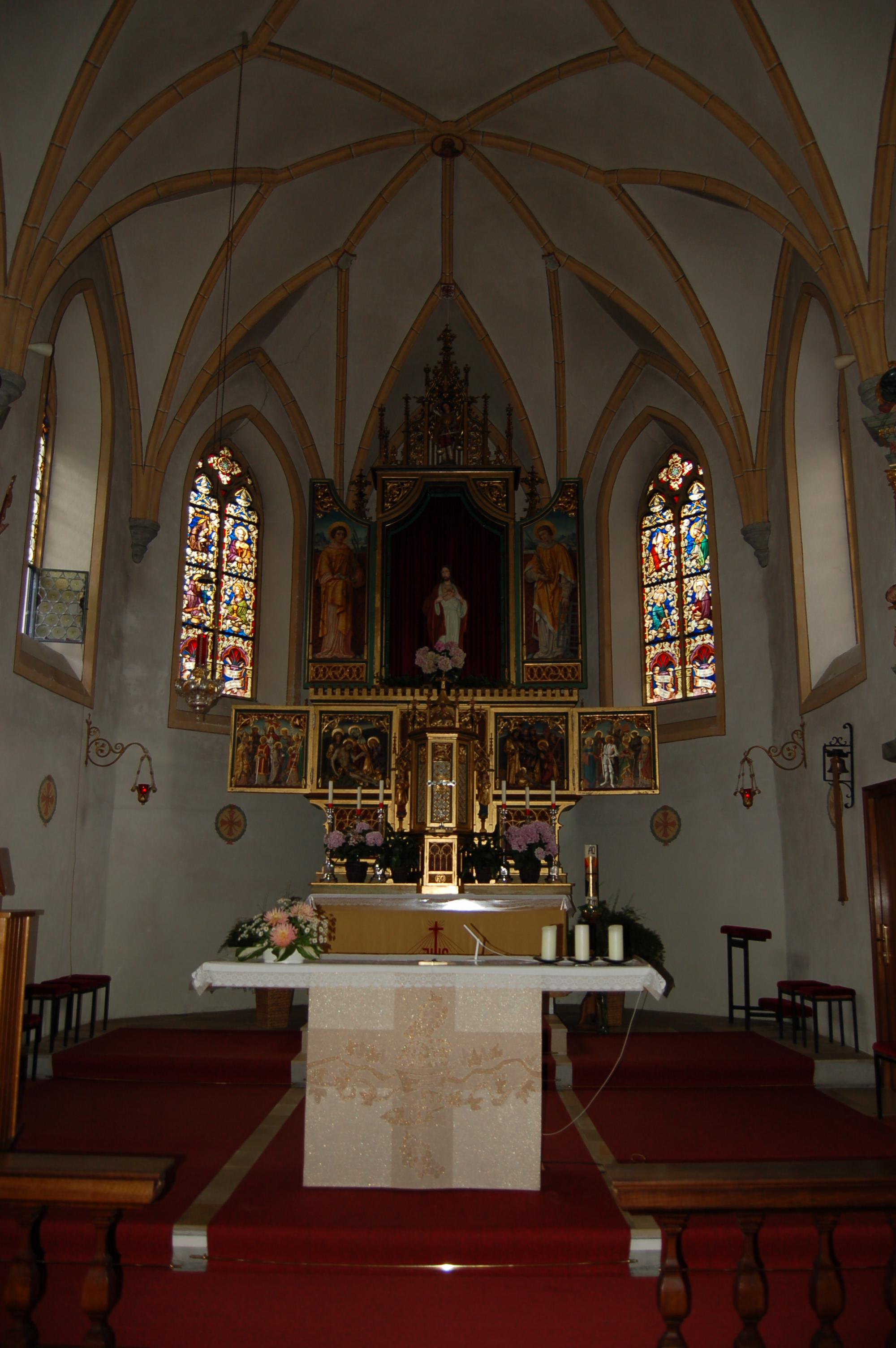 Die denkmalgeschützte Pfarrkirche in Grafendorf (Gemeinde Gaimberg) im Bezirk Lienz.